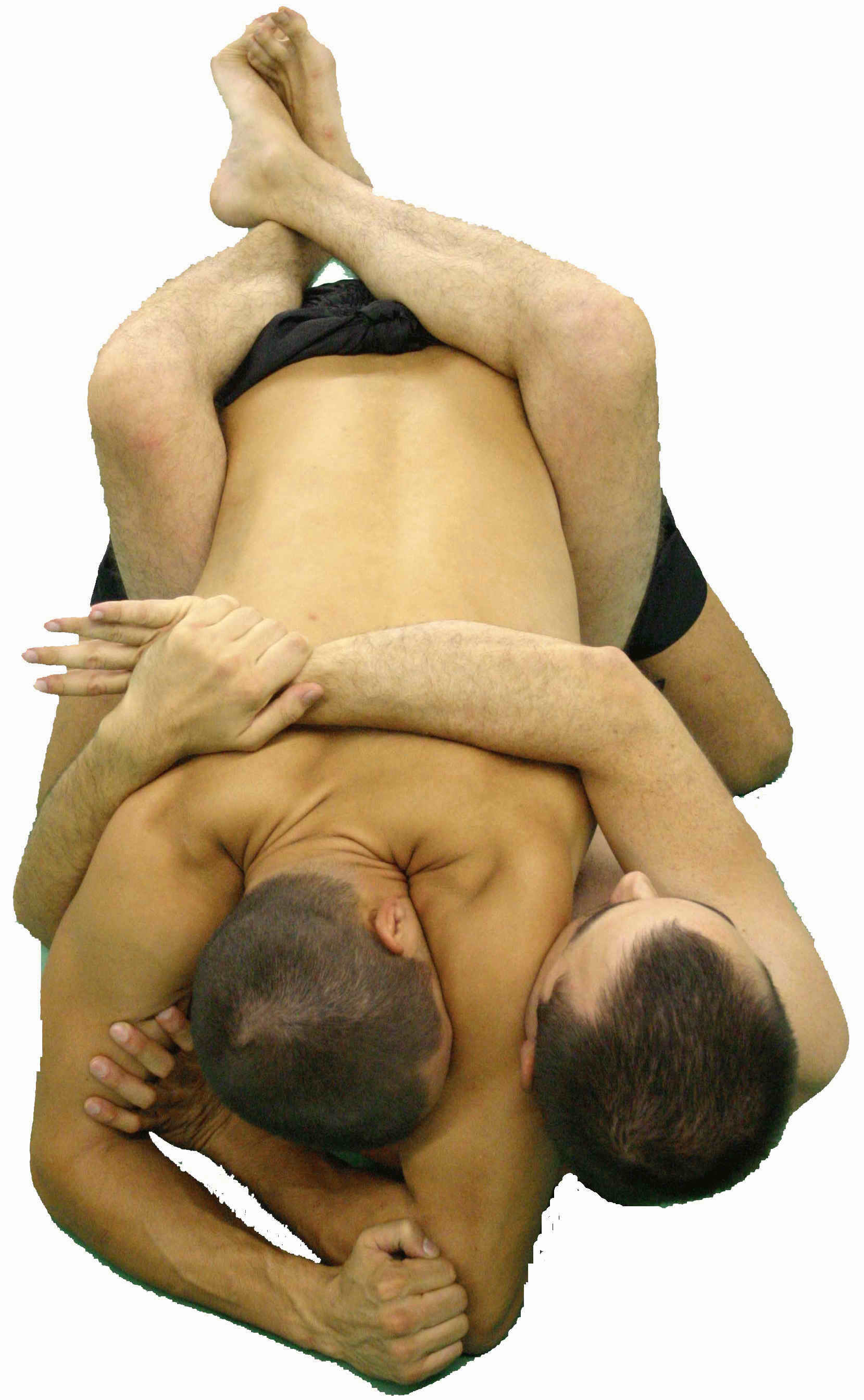 naban.jpg